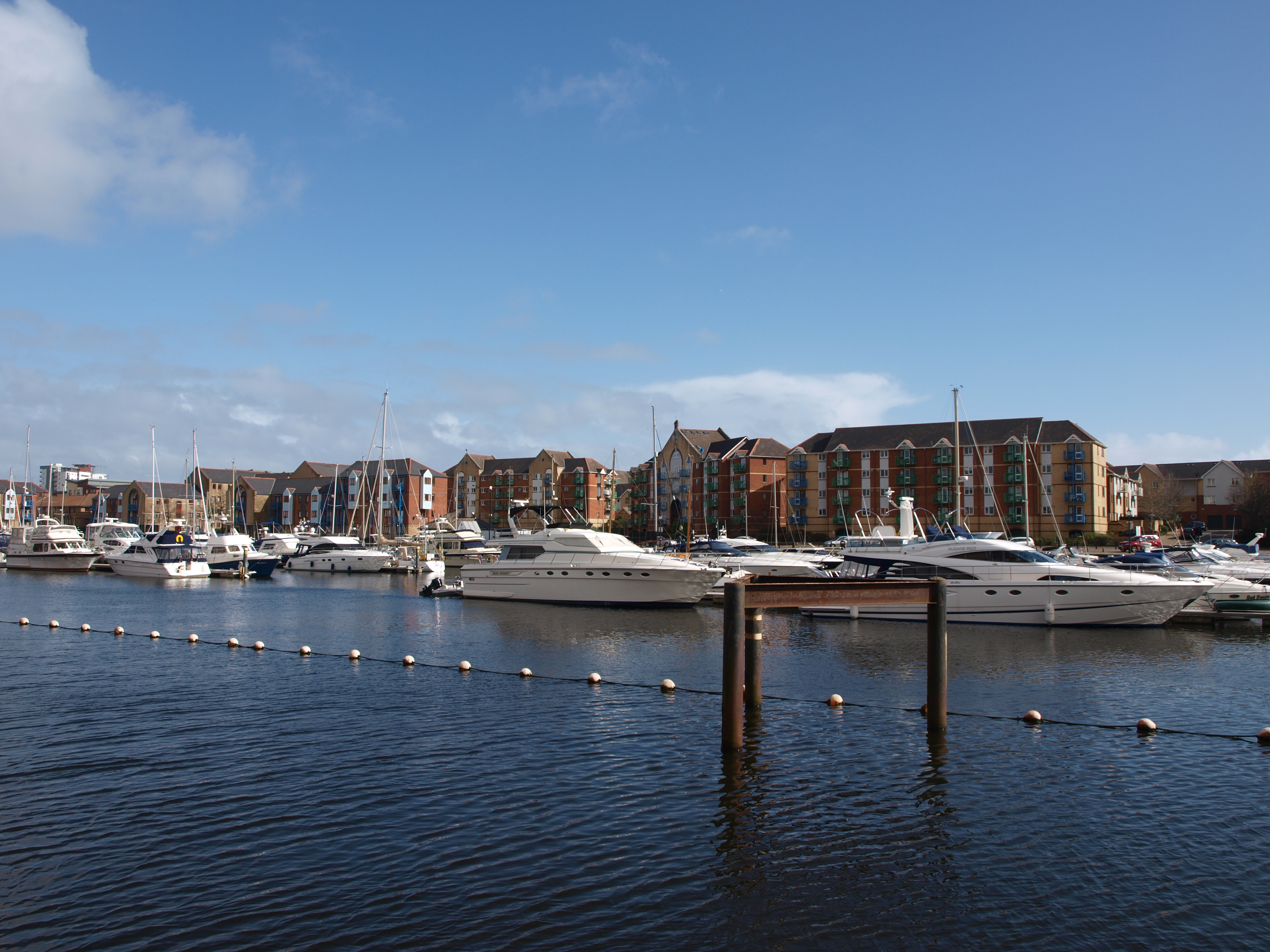 Swansea Marina